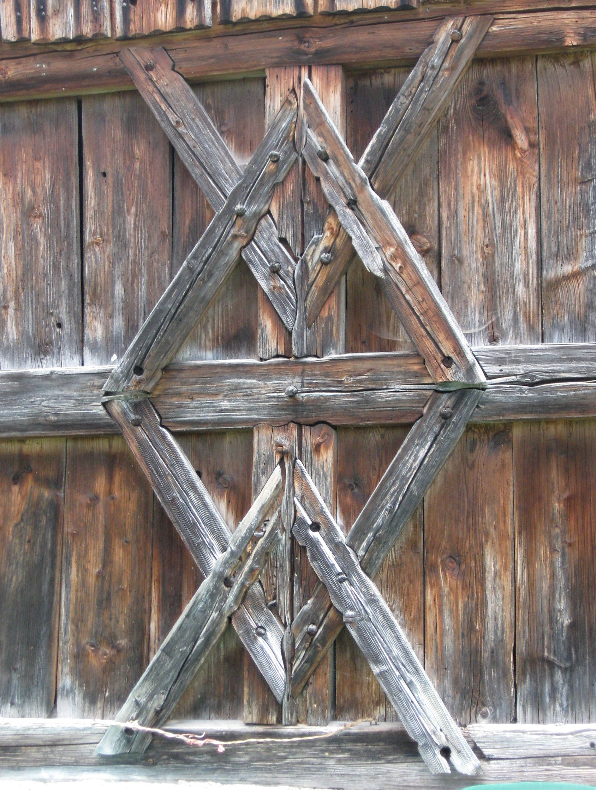 Doblberg Haus Nr. 5. Bauernhaus, Einfirsthof, an drei Seiten Bundwerk, 1. Viertel 19. Jh.